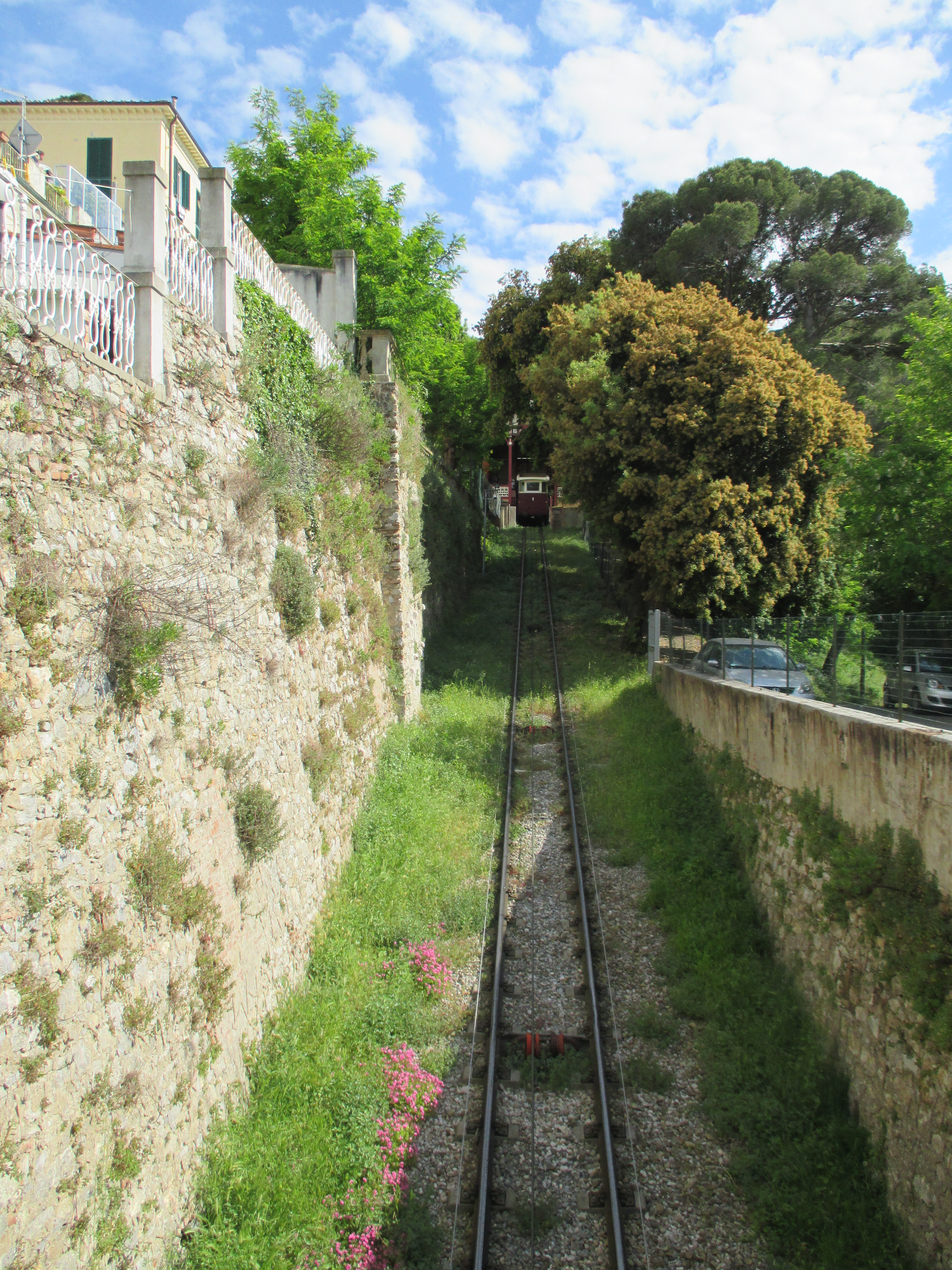 Livorno, funicolare di Montenero: veduta della linea verso la stazione di Montenero alto, a breve distanza dal santuario mariano.